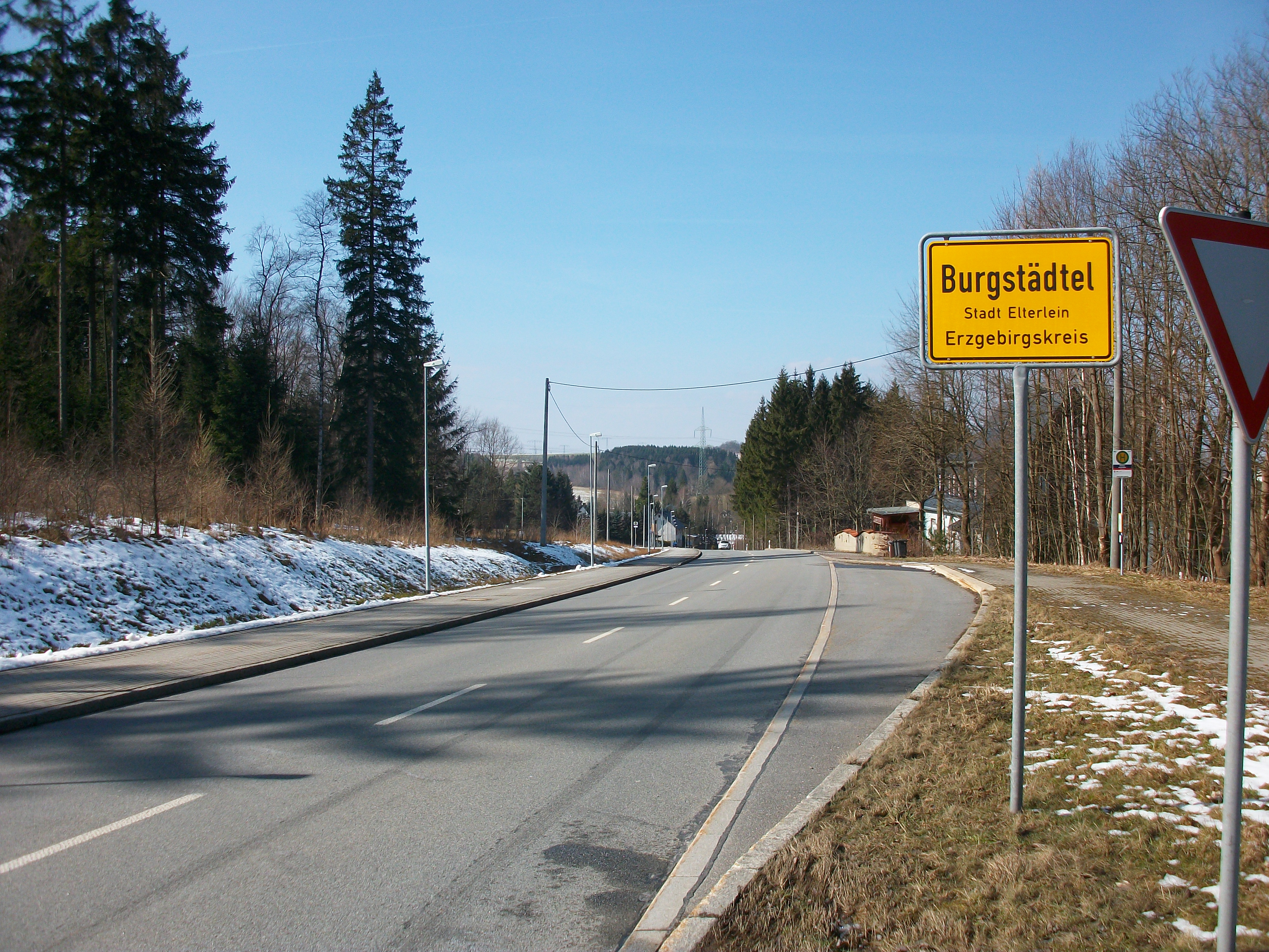 Burgstädtel, Ortsteingang